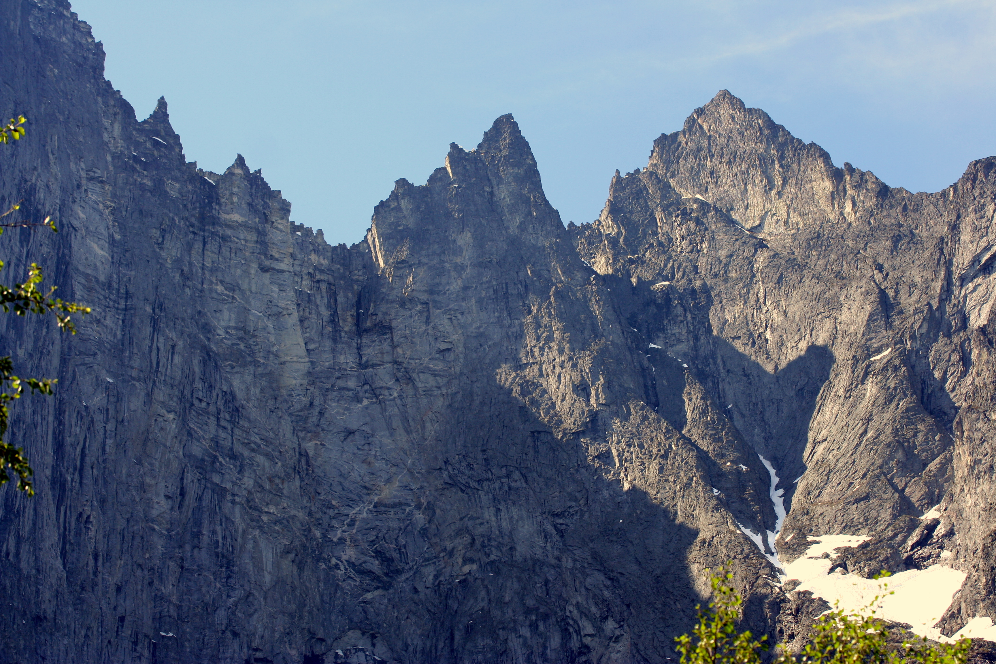 Trollveggen